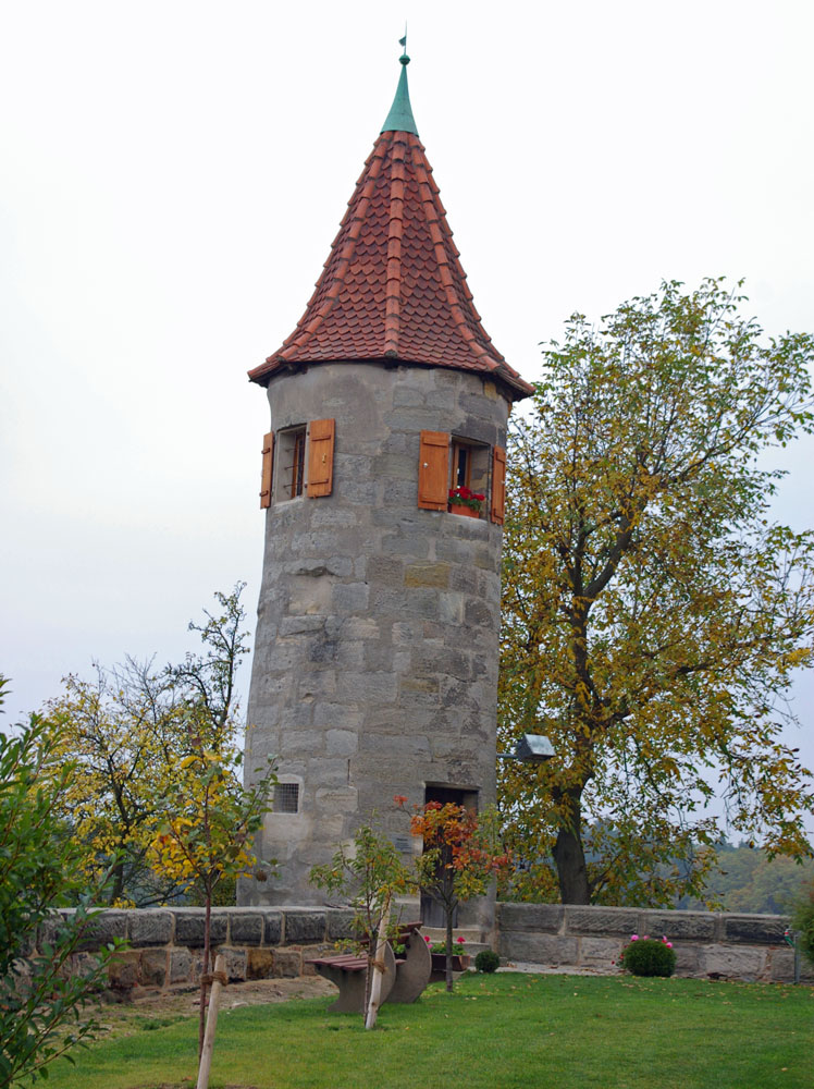 Der Hungerturm, letzter Rest des 1898 von der evangelischen Kirchengemeinde abgetragenen Schlosses Schönberg.